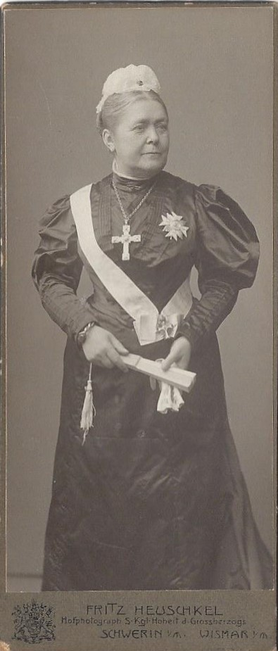 Auguste Elenore von Bassewitz (* 28. Oktober 1841; † 7. Dezember 1925 in Dobbertin). Eingeschrieben am 1. November 1844 unter der Nr. 1287 im Dobbertiner Einschreibebuch, kam 1887 in das Kloster Dobbertin}. Am 22. Juli 1900 zur Priorin gewählt, ab 8. August 1906 Domina.